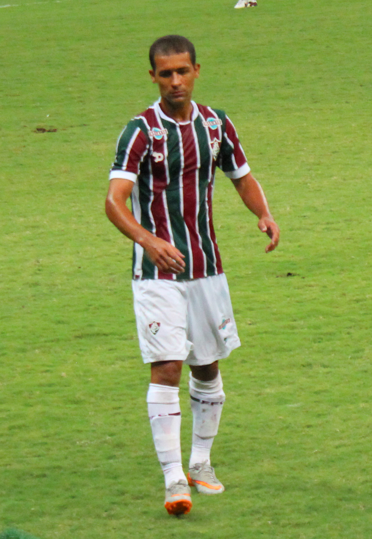 Pierre na partida Fluminense x Internacional, semifinal Primeira Liga, Estádio Nacional Mané Garrincha, Brasília (DF), Brasil.